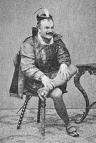 Anders Willman (1834-1898) som Mefistofeles i Gounods Faust